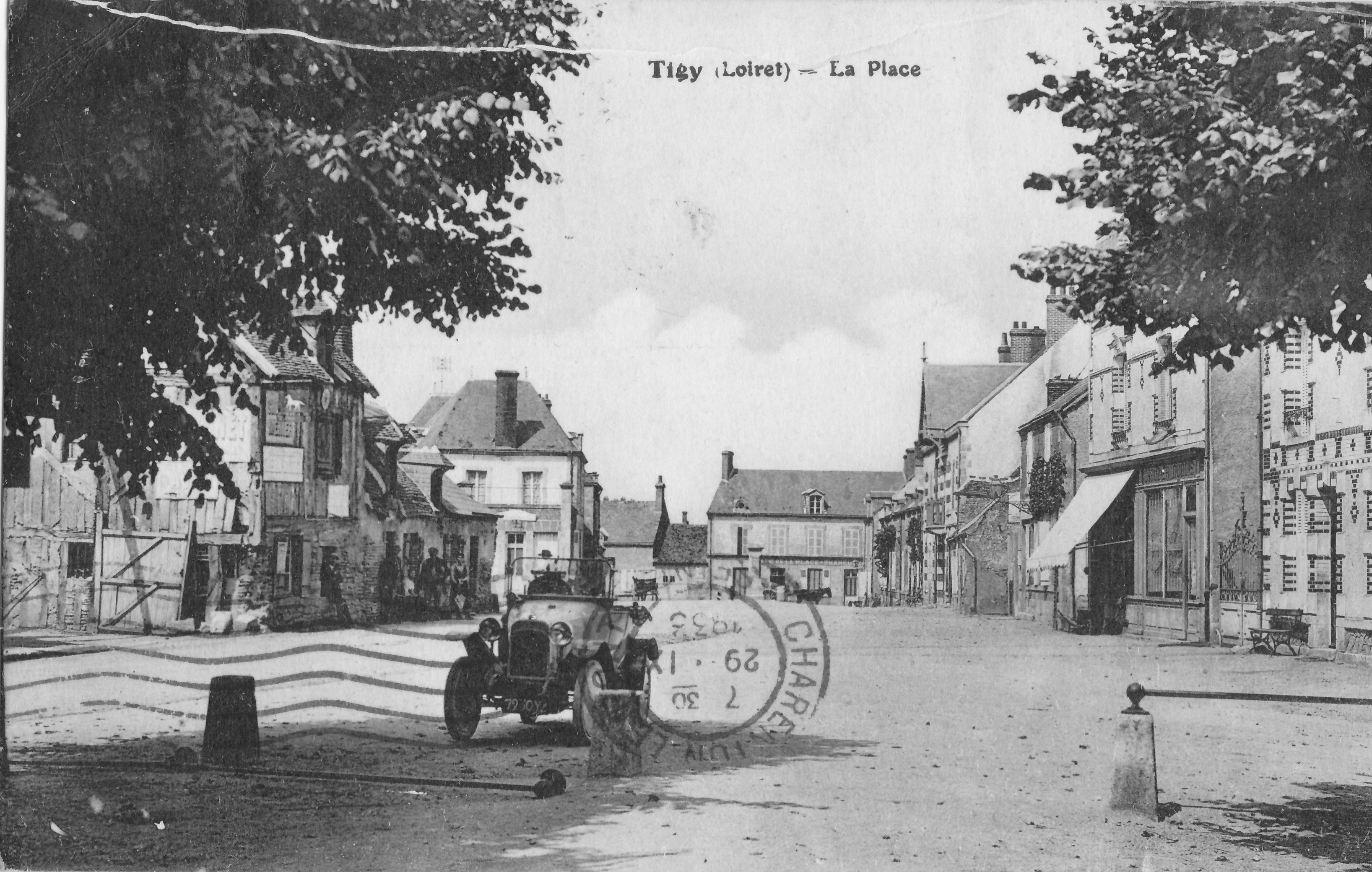 Carte postale ancienne montrant la place de Tigy vers 1933